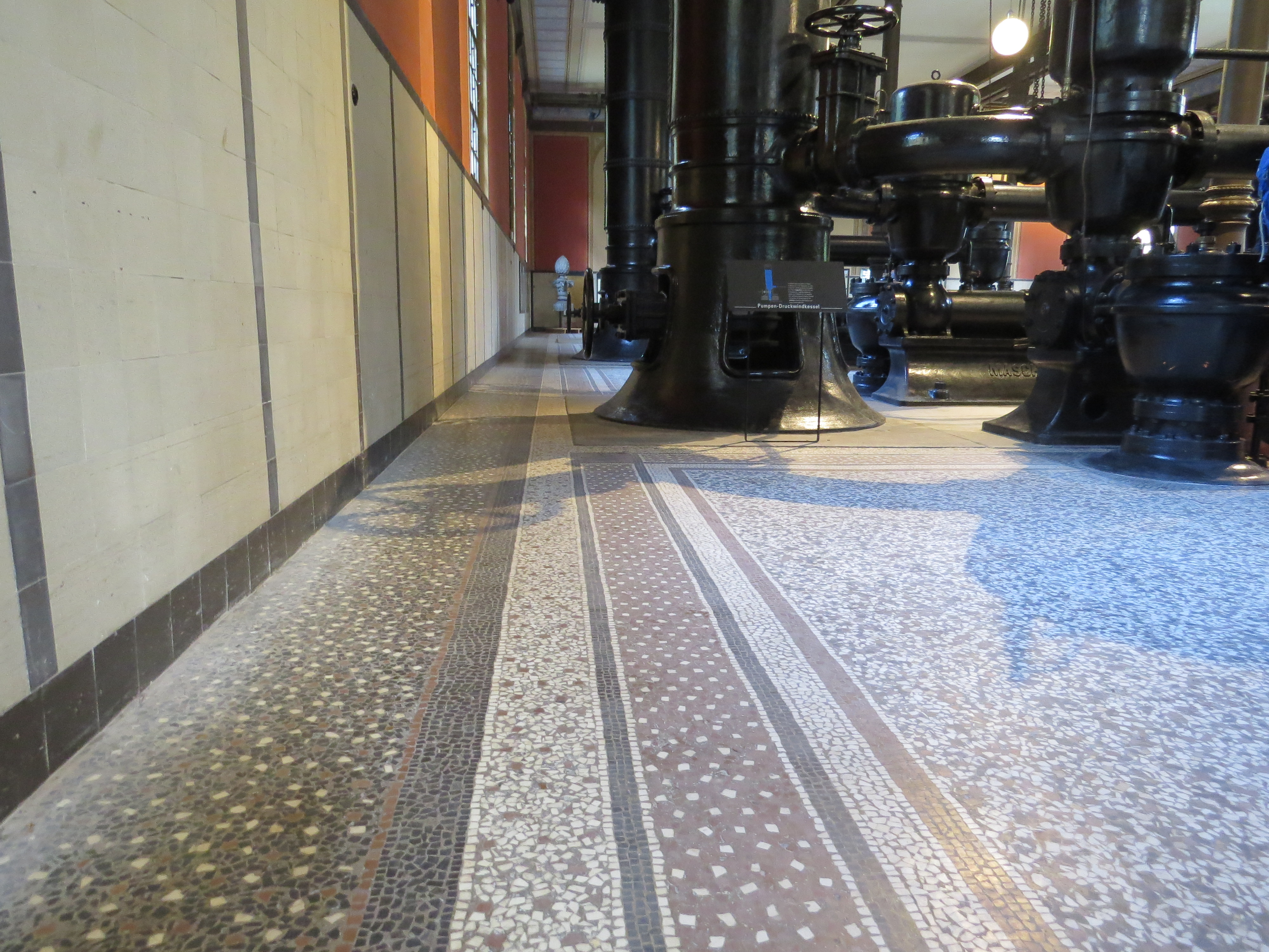 Wasserwerk am Hochablass: Terrazzo-Boden